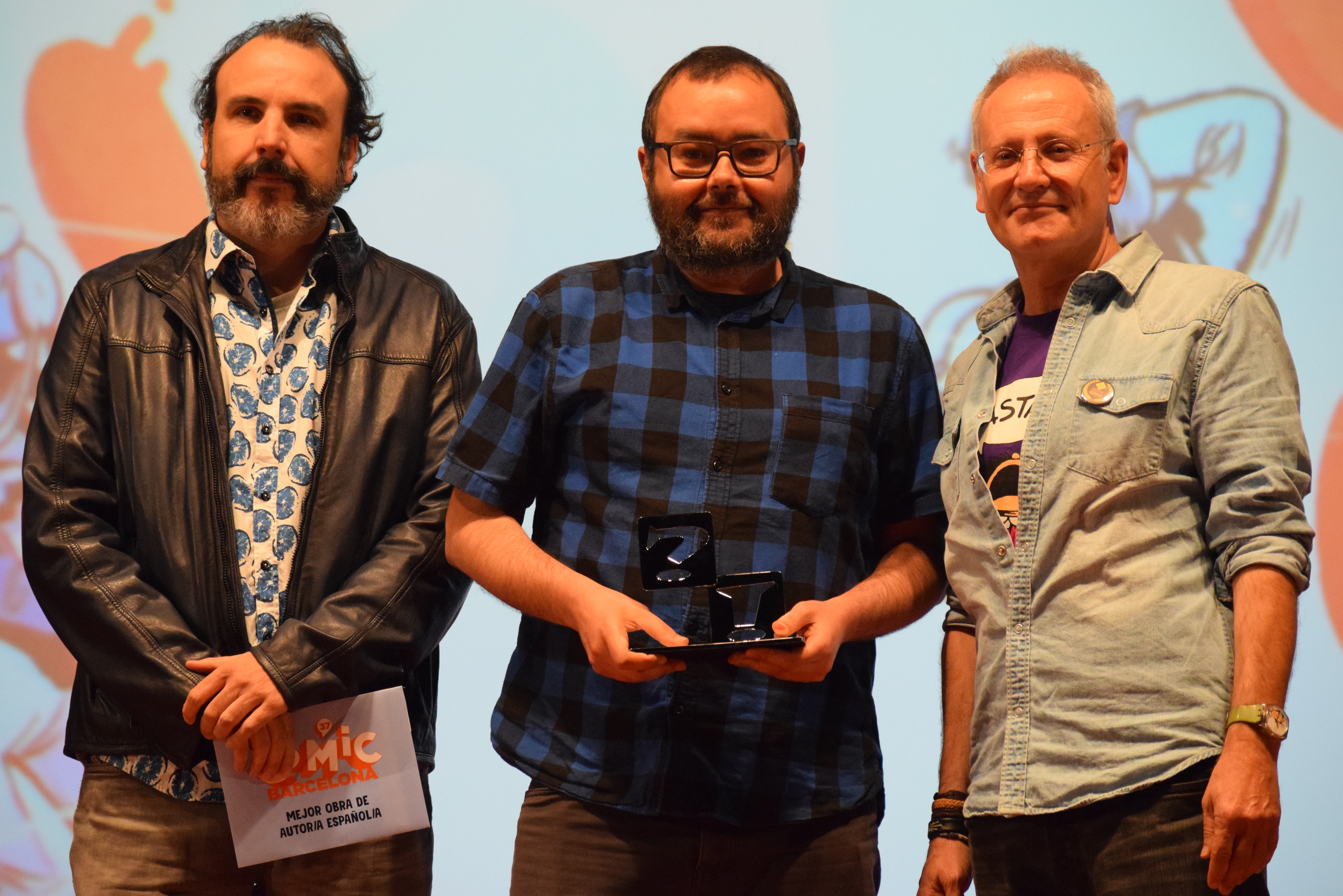 El dibuixant Albert Monteys rep el premi a la millor obra de la mà de l'autor Angel de la Calle. Monteys fou guanyador del premi a la Millor Obra d'Autor Espanyol pel còmic ¡Universo! (Astiberri). 37. Comic Barcelona, 2019.